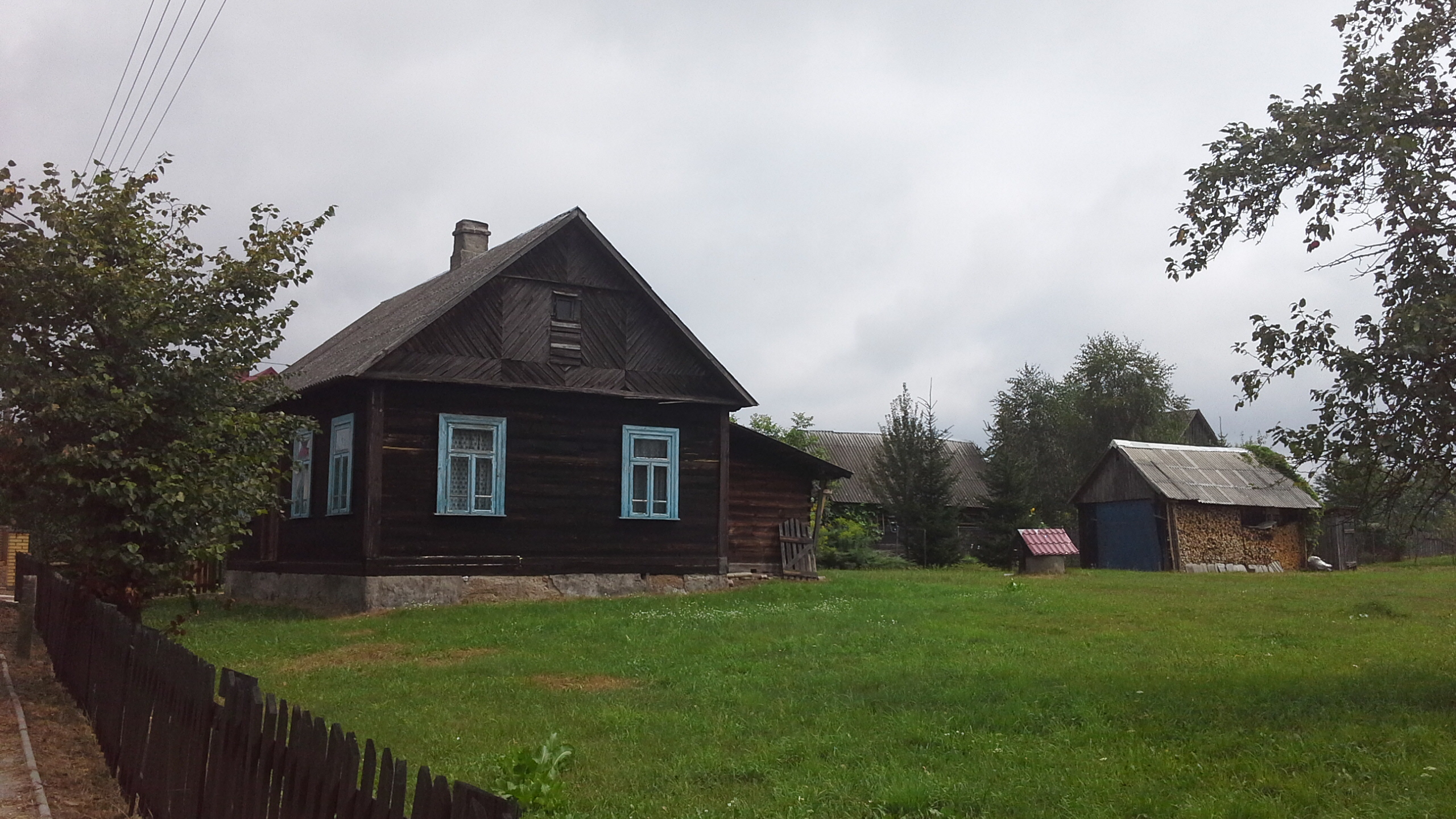 Drewniany dom mieszkalny przy głównej ulicy Żerczyc.